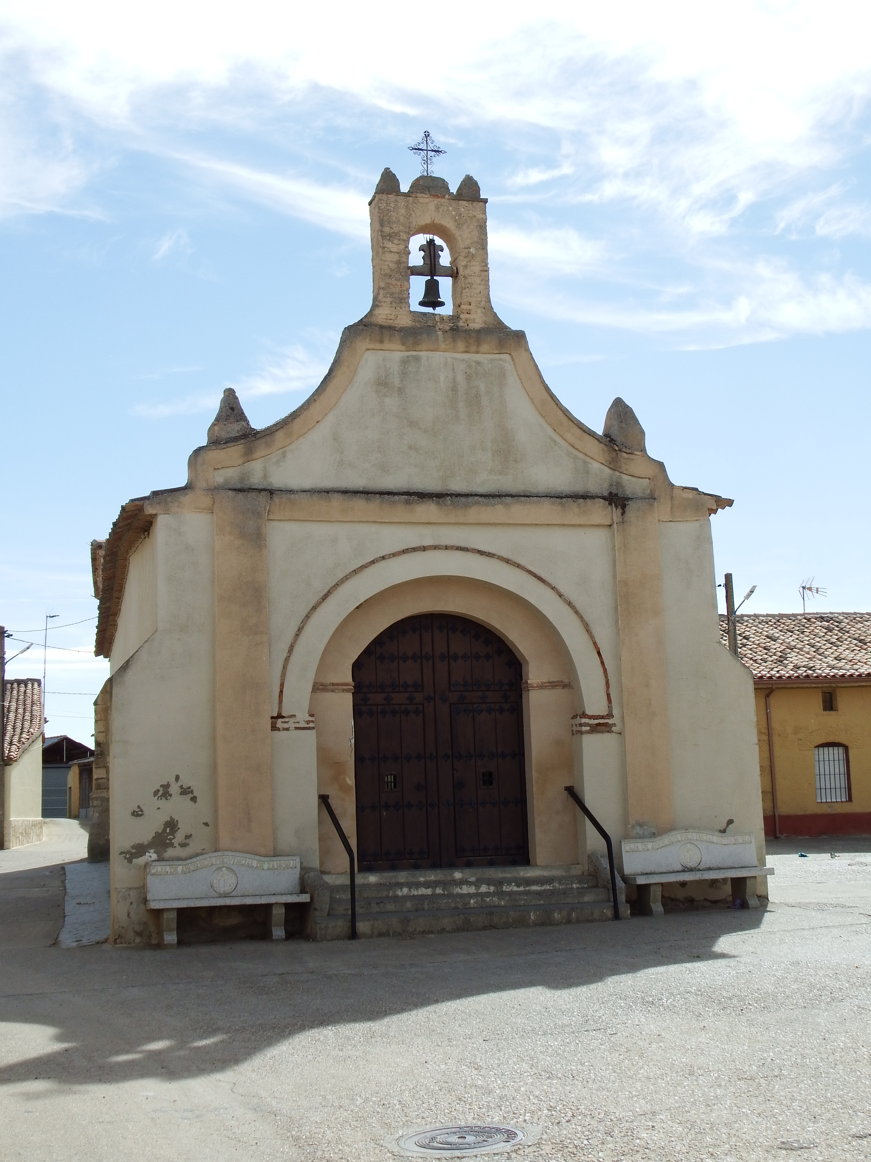 Bustillo del Oro